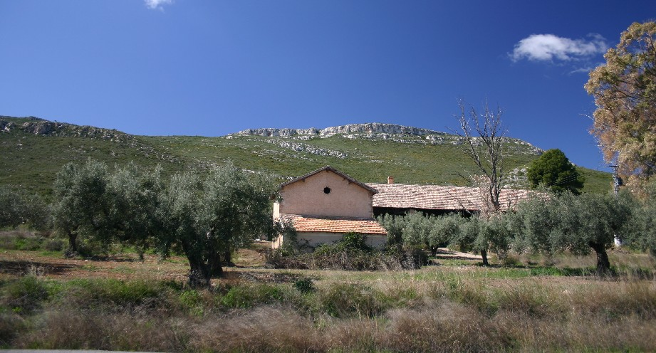 Panoramica de La Mancha serrana (Horno Ciego, Elche de la Sierra, Albacete)